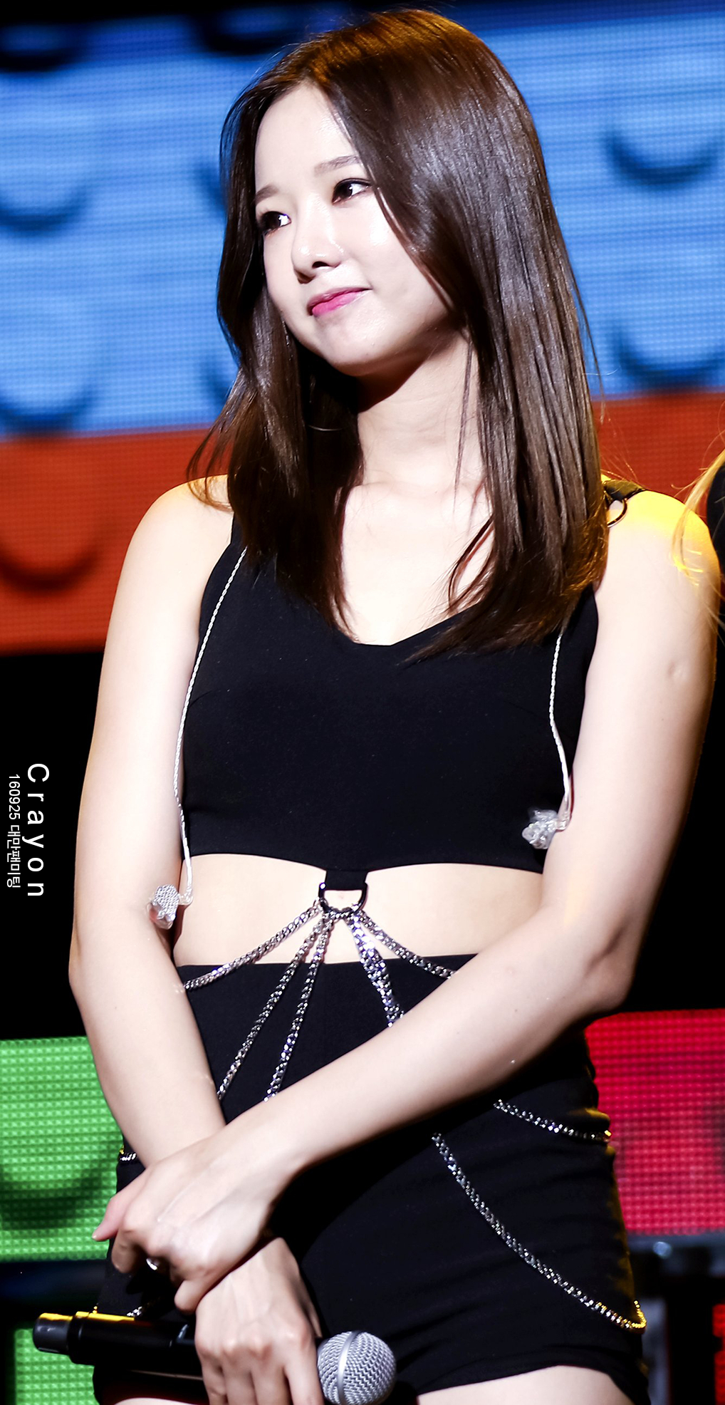 160925 대만팬미팅